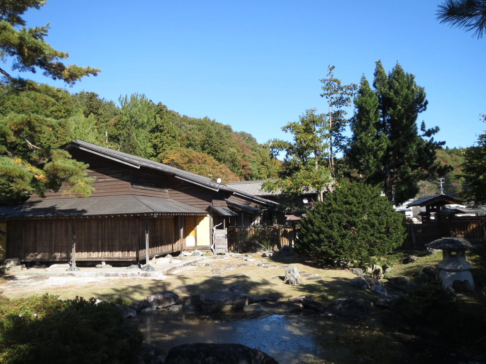 宮古市にある盛合家住宅